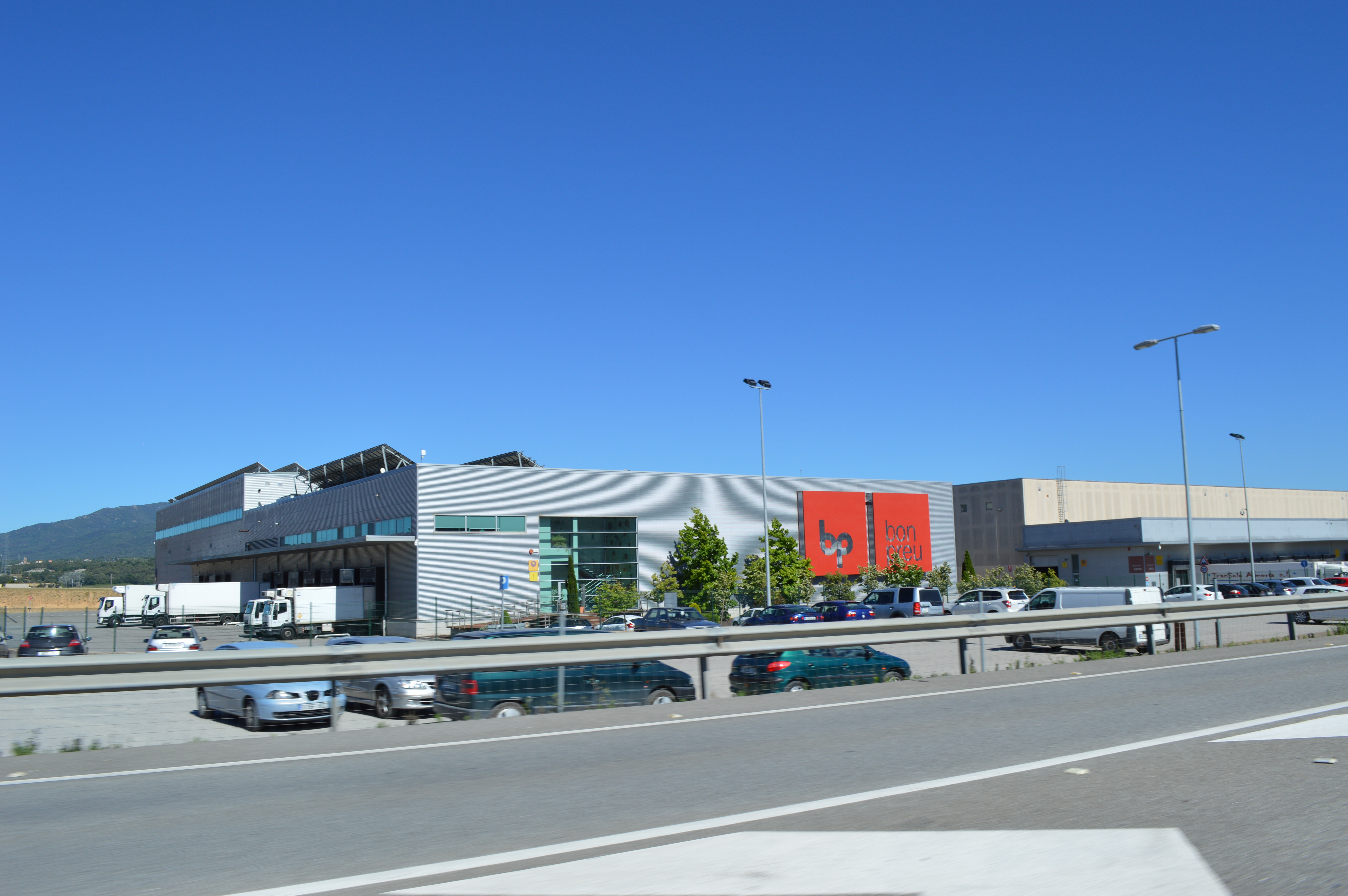 Plataforma logística de Balenyà, situada a l'autovia C-17.